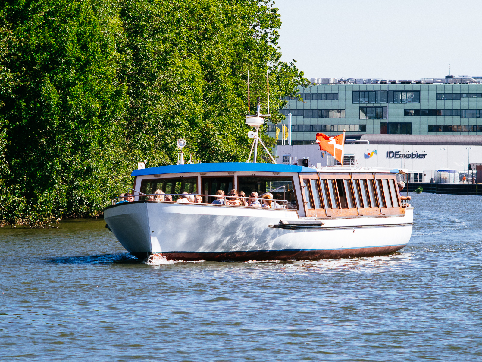 Næstved Kanal